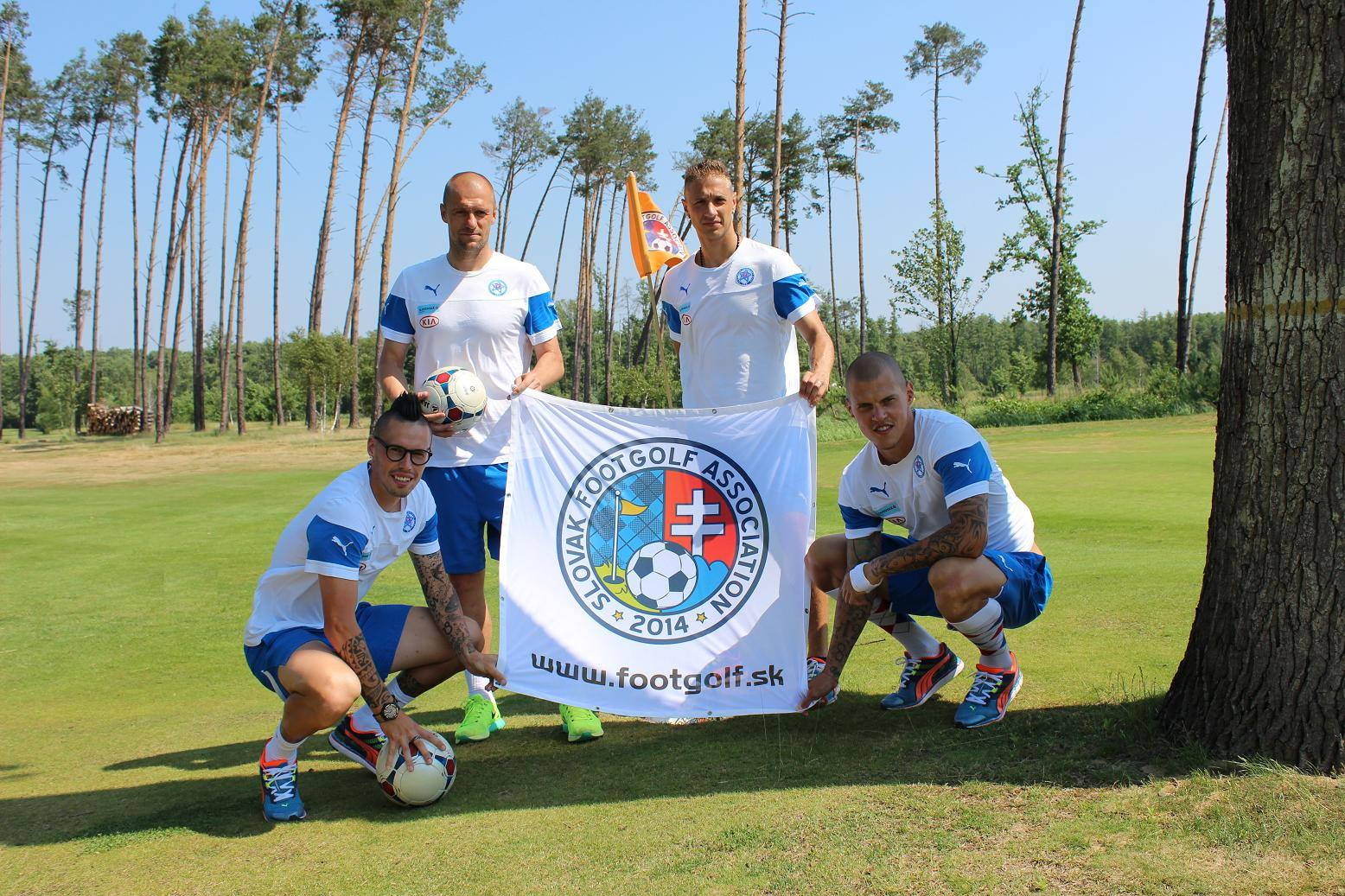 SFZ FootGolf